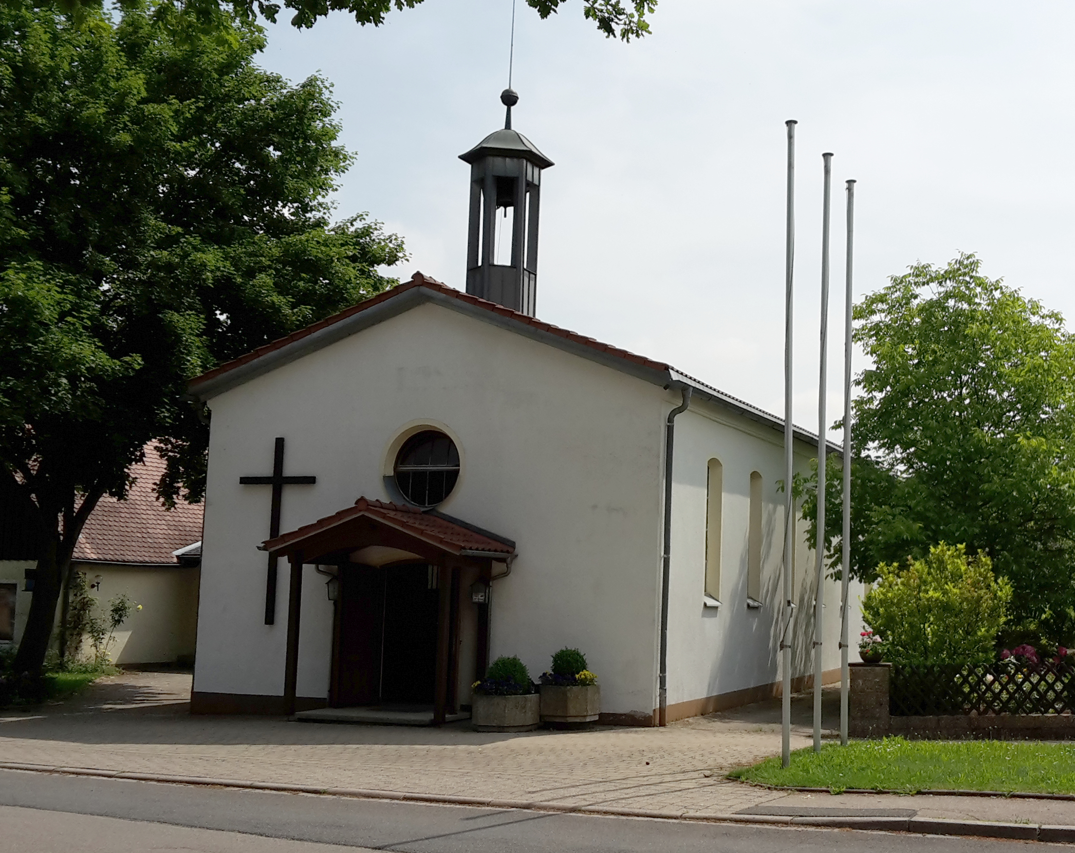 Römisch-katholische Pfarrkirche St. Johannes der Täufer in Lichtenau